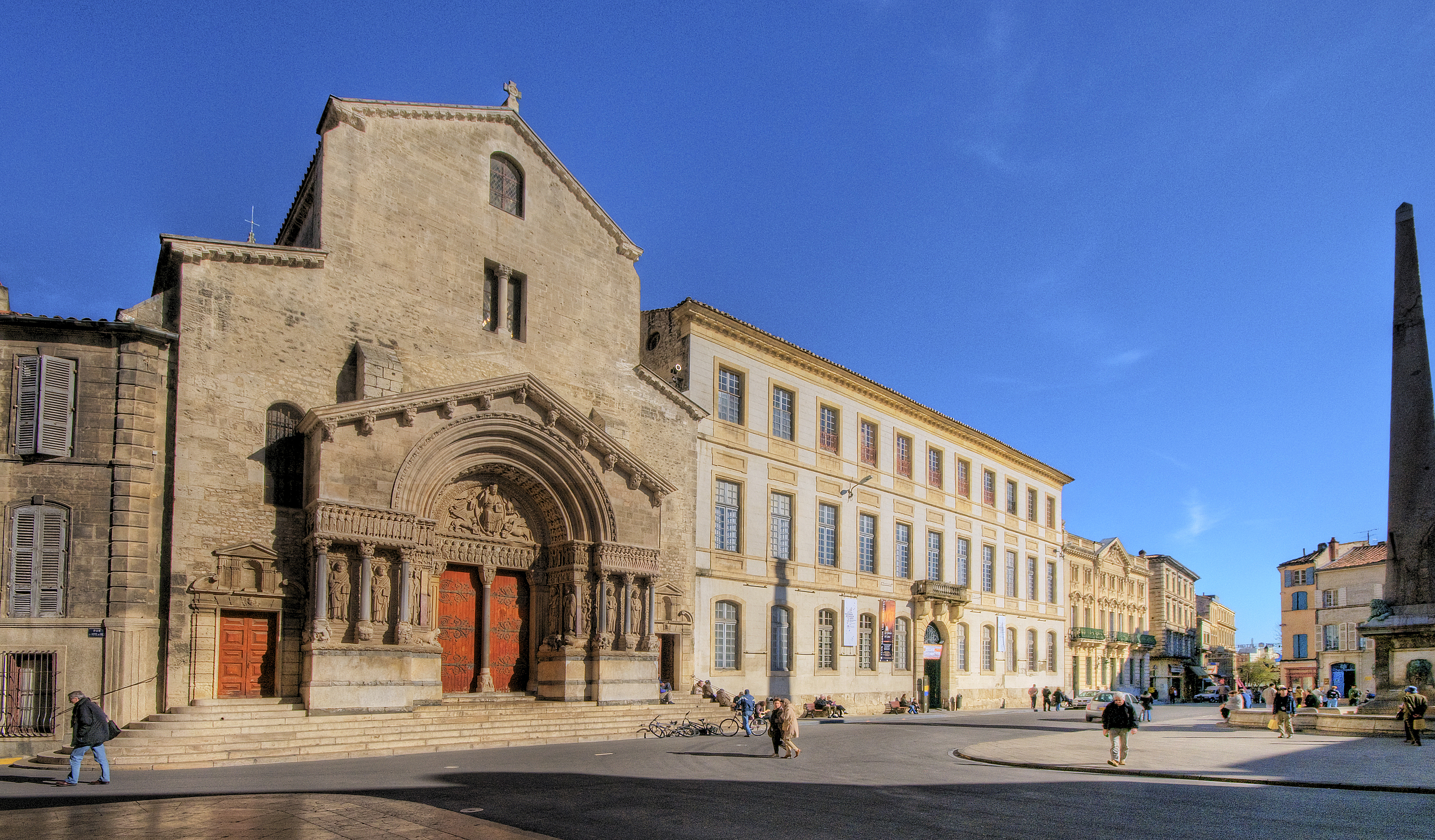 Arlés, France, Église Saint-Trophime